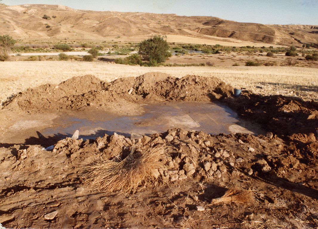 El mosaico de las Metamorfosis, tras su descubrimiento en 1983